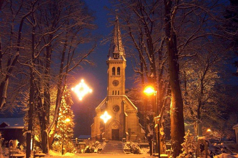 Die Pfarrkirche Herz Jesu in der niederösterreichischen Gemeinde Weissenbach an der Triesting. weihnachtlich gestimmte Synthese aus Architektur und Natur, eine mächtige Lindenallee als Vorbereich der Pfarrkirche.